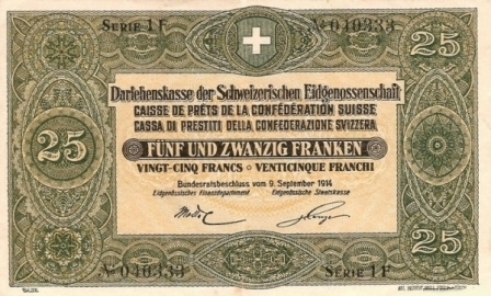 Svájc 25 frankos államjegy 1914.